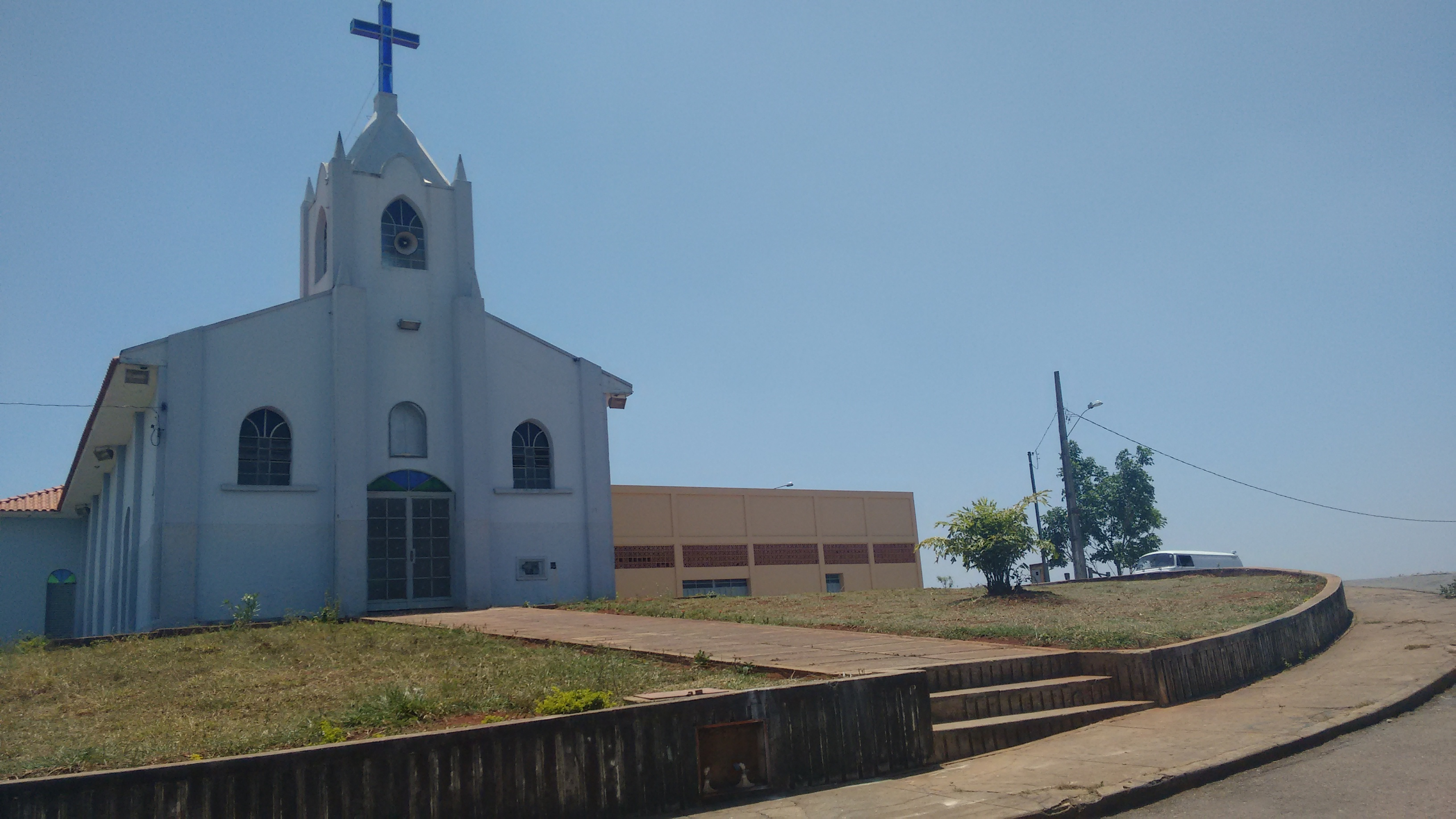 Praça São Sebastião, no Bairro Vila Gontijo, em Bom Despacho, com vista para a Igreja de São Sebastião e para o Salão Comunitário da Comunidade São Sebastião.